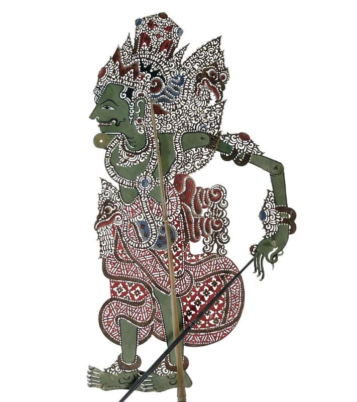 Schaduwfiguur. Wajangfiguur Unknown language: Wayang purwa